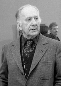 Gabriele Mucchi alla presentazione di una mostra a lui dedicata all'Altes Museum di Berlino.